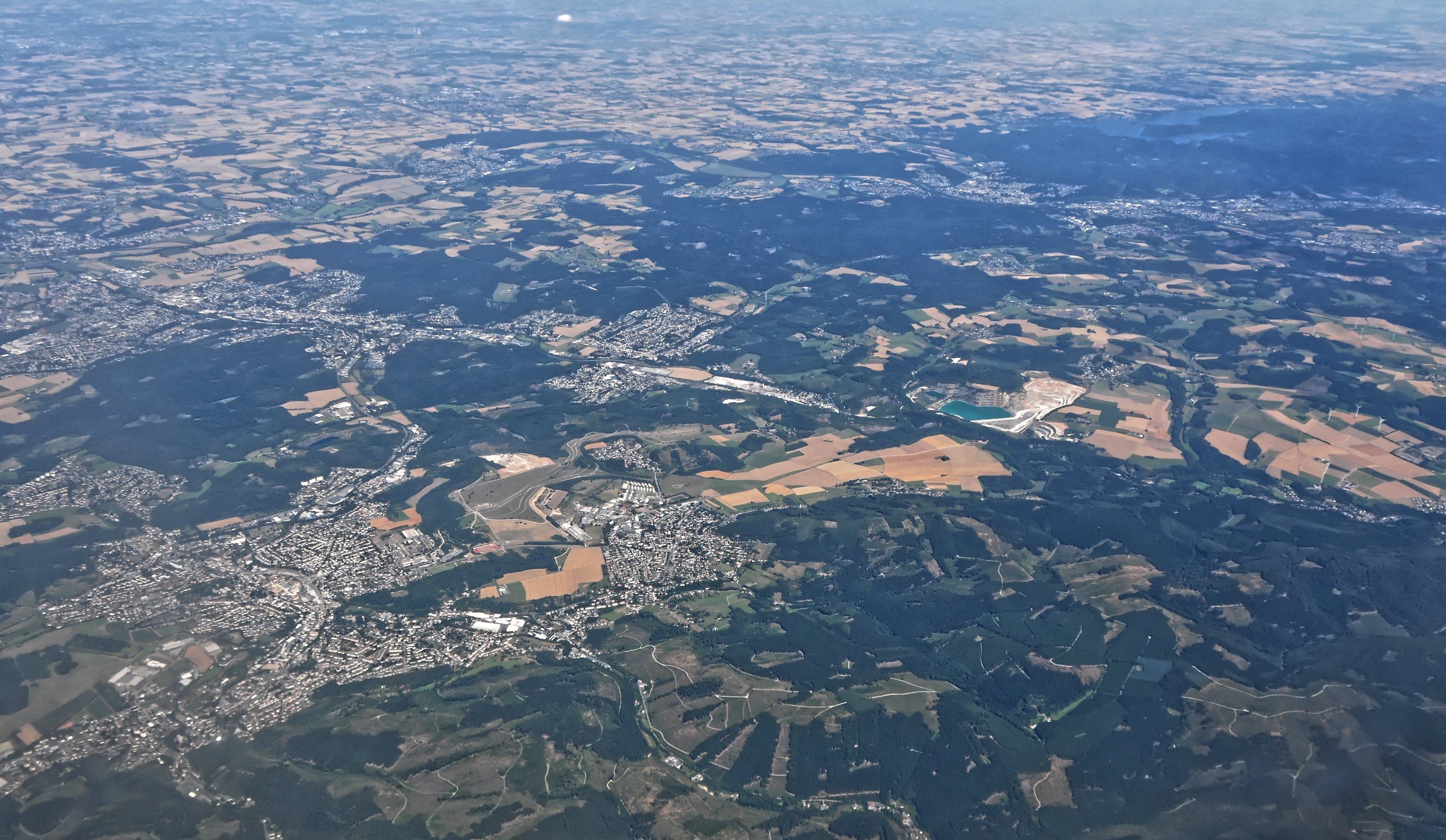 Bilder vom Flug -Rom-Düsseldorf-Hamburg 2013 Dieses Foto entstand in Zusammenarbeit mit Stadtbesichtigungen.de Die Seiten Stadtbesichtigungen.de, der dazugehörige Reise Blog sowie die Facebookseite: Stadtbesichtigungen Rom dürfen dieses Bild für Ihre Veröffentlichungen ohne den Hinweis auf Wikipedia, Commons bzw der Lizenz verwenden. Die Verantwortlichen habe von mir (Ra Boe) die Originaldaten zur freien Verfügung übermittelt bekommen.